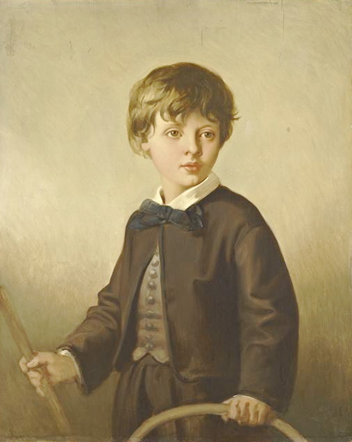 Henri Mottez enfant (1858-1937)